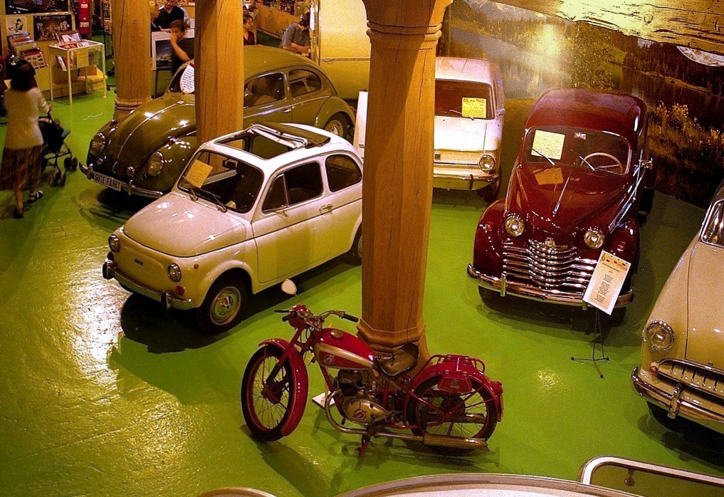 Blick in das frühere Automobilmuseum von Fritz B. Busch in Wolfegg. Eine Besonderheit war die lockere Präsentation der Exponate sowie die gleichermaßen fachkundige wie zum Teil humorvolle Informationen. Die Fahrzeuge im Bild: VW Käfer, Fiat 500 Nuova, NSU Prinz IV, Opel Olympia, Opel Rekord und Hoffmann-Motorrad)